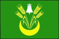 Bezděčí u Trnávky, vlajka. Zelený list, v dolní střední části půlměsíc s cípy k hornímu okraji listu. Mezi cípy dvě dvojice odkloněných obilných klasů, každý s listem, vše žluté. Mezi klasy bílý zvon se závěsem. Poměr šířky k délce listu je 2 : 3.